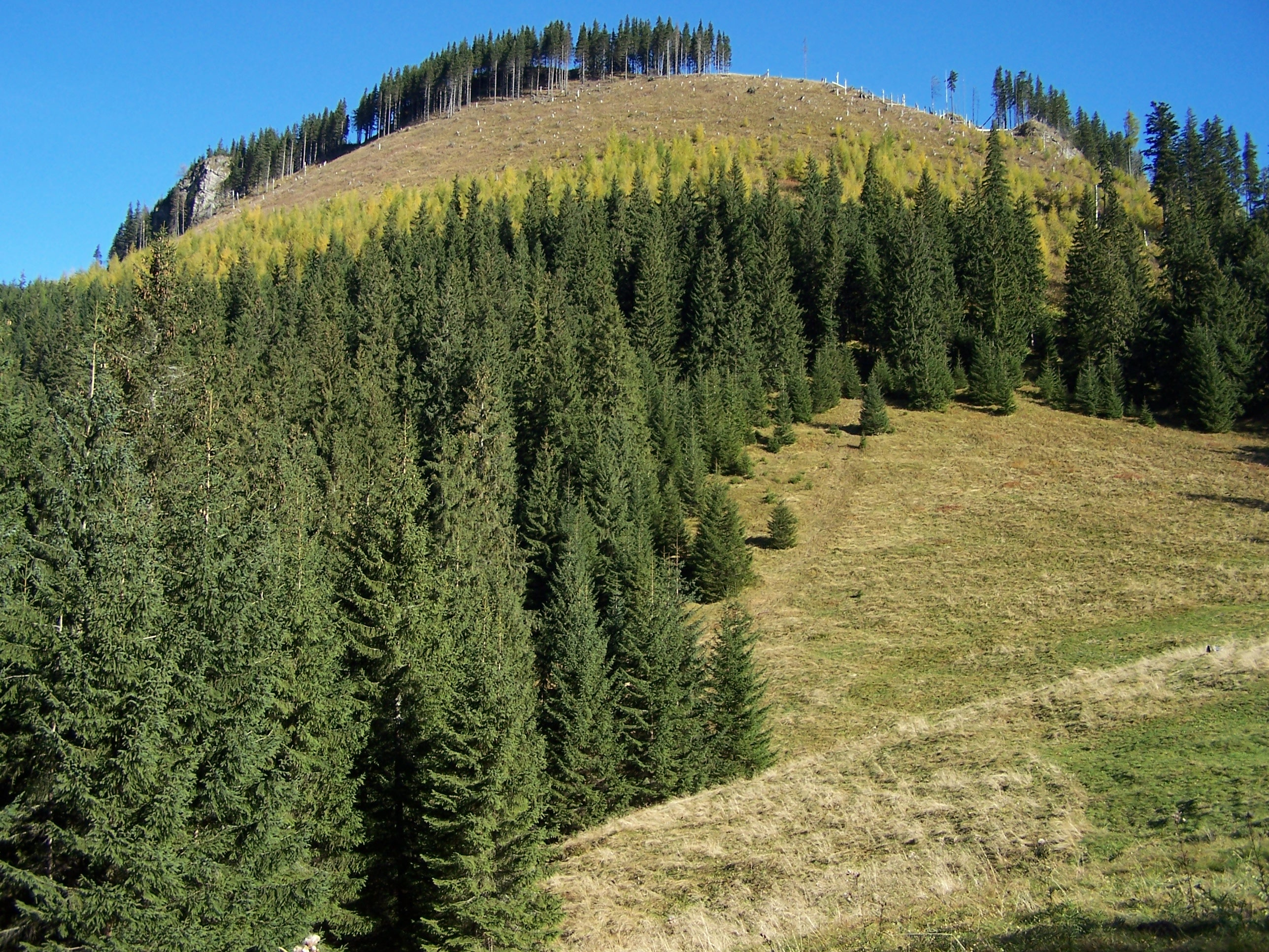 Zadnia Kopka z Świńską Turnią i Przysłop Kominiarski